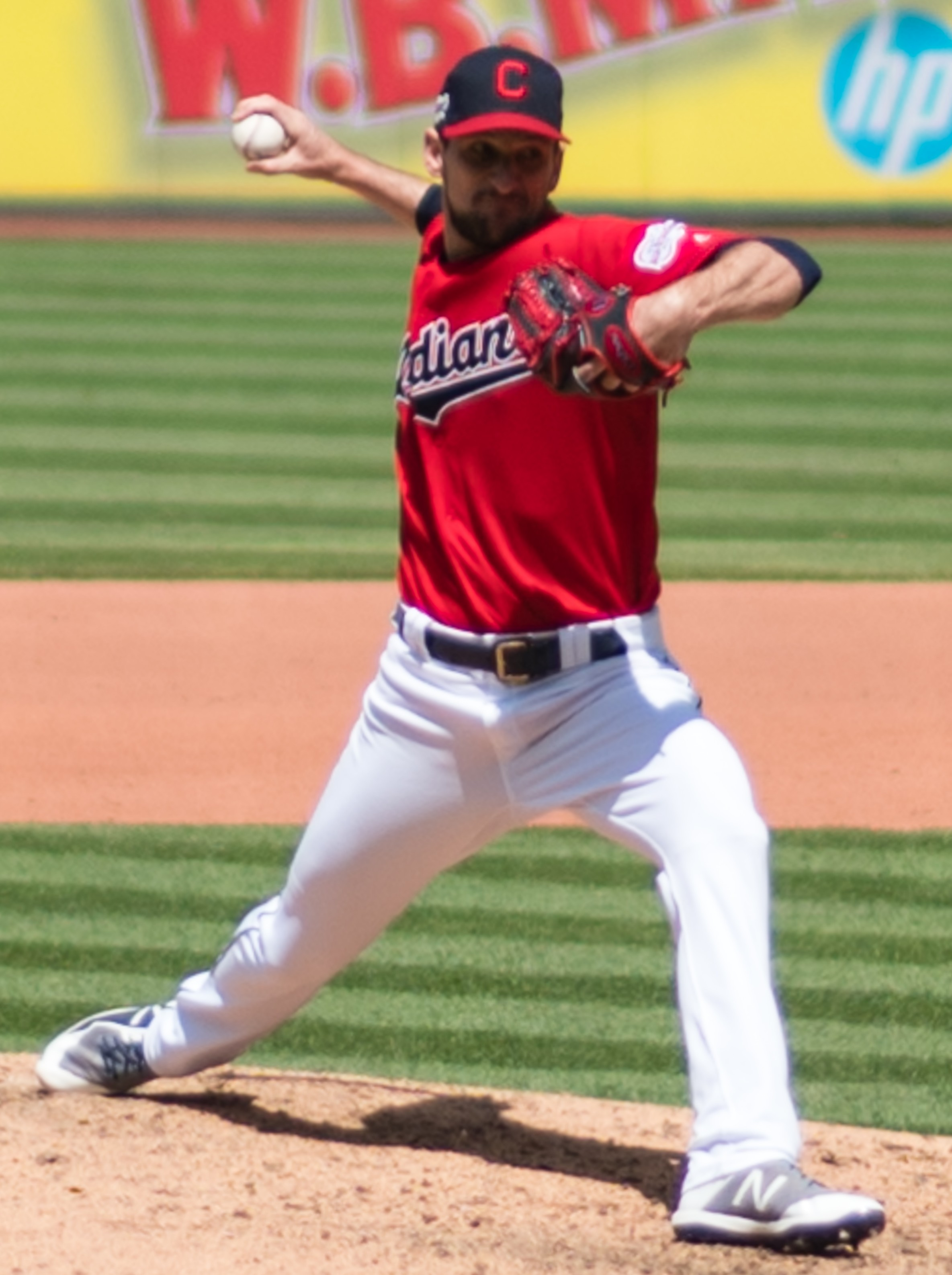 Seattle Mariners VS. Cleveland Indians